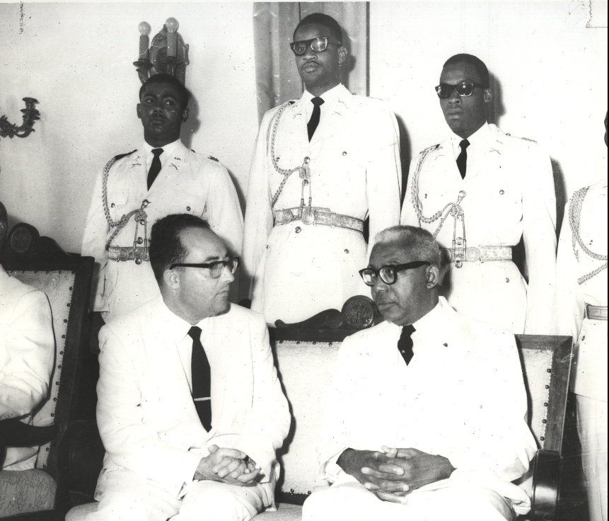 Francois Duvalier and Joel Barromi ( Israeli delegate to Haiti)